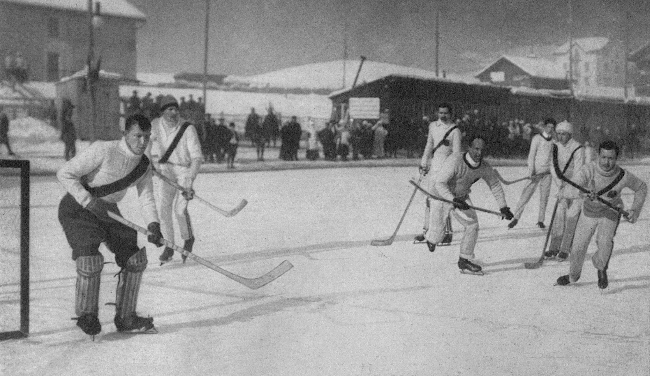 SPORT IM BILD, 1911, Nr. 5, S. 115 Vom internationalen Eishockey-Turnier in Chamonix: England gegen Belgien (schwarze Schärpe) Photo: M. Williams